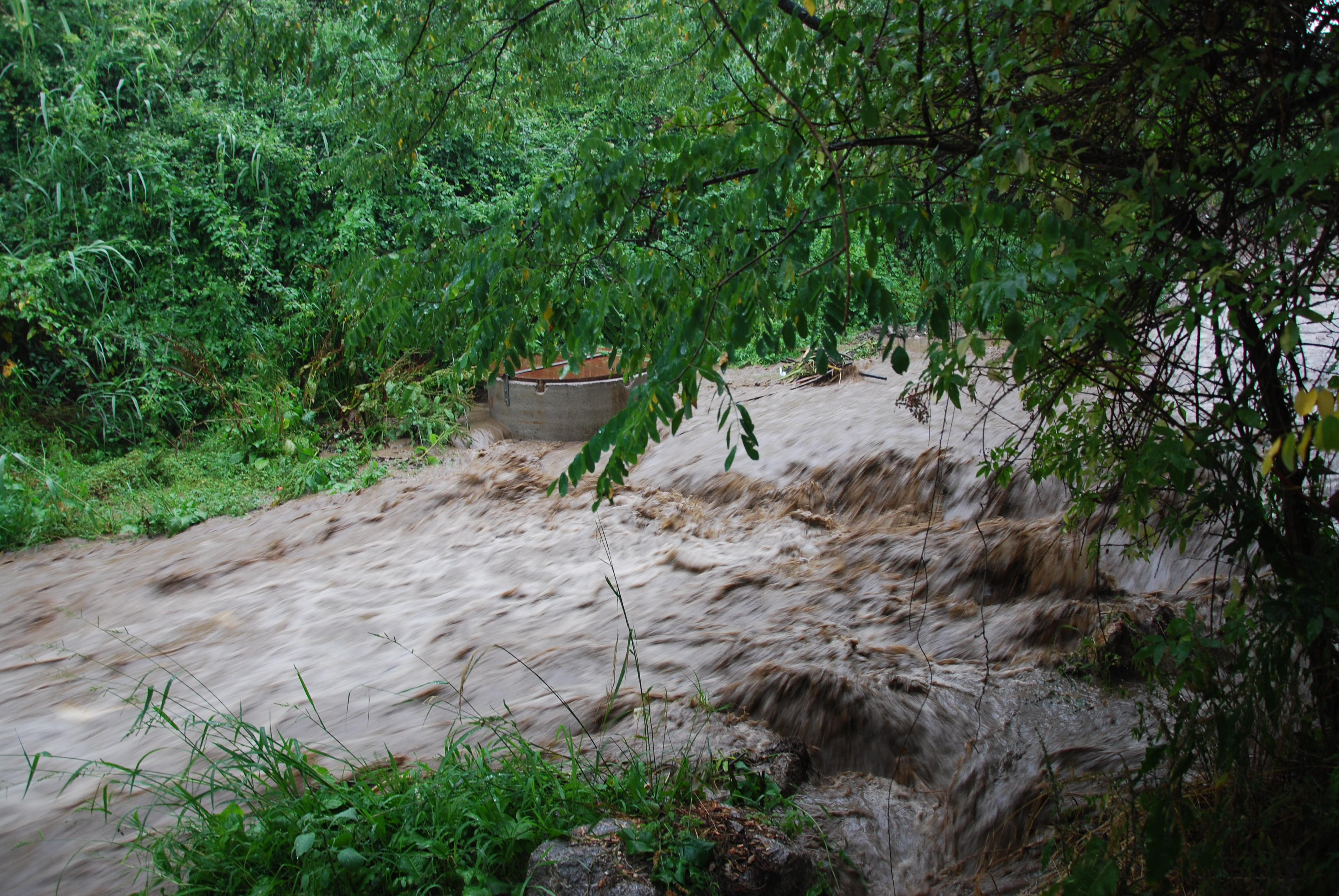 La riera de Canyet baixant plena després d'un aiguat d'estiu